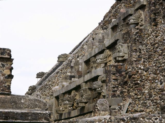 Templo de Quetzalcóatl em Teotihuacán, México; Fotografia tirada em Fevereiro de 2004.